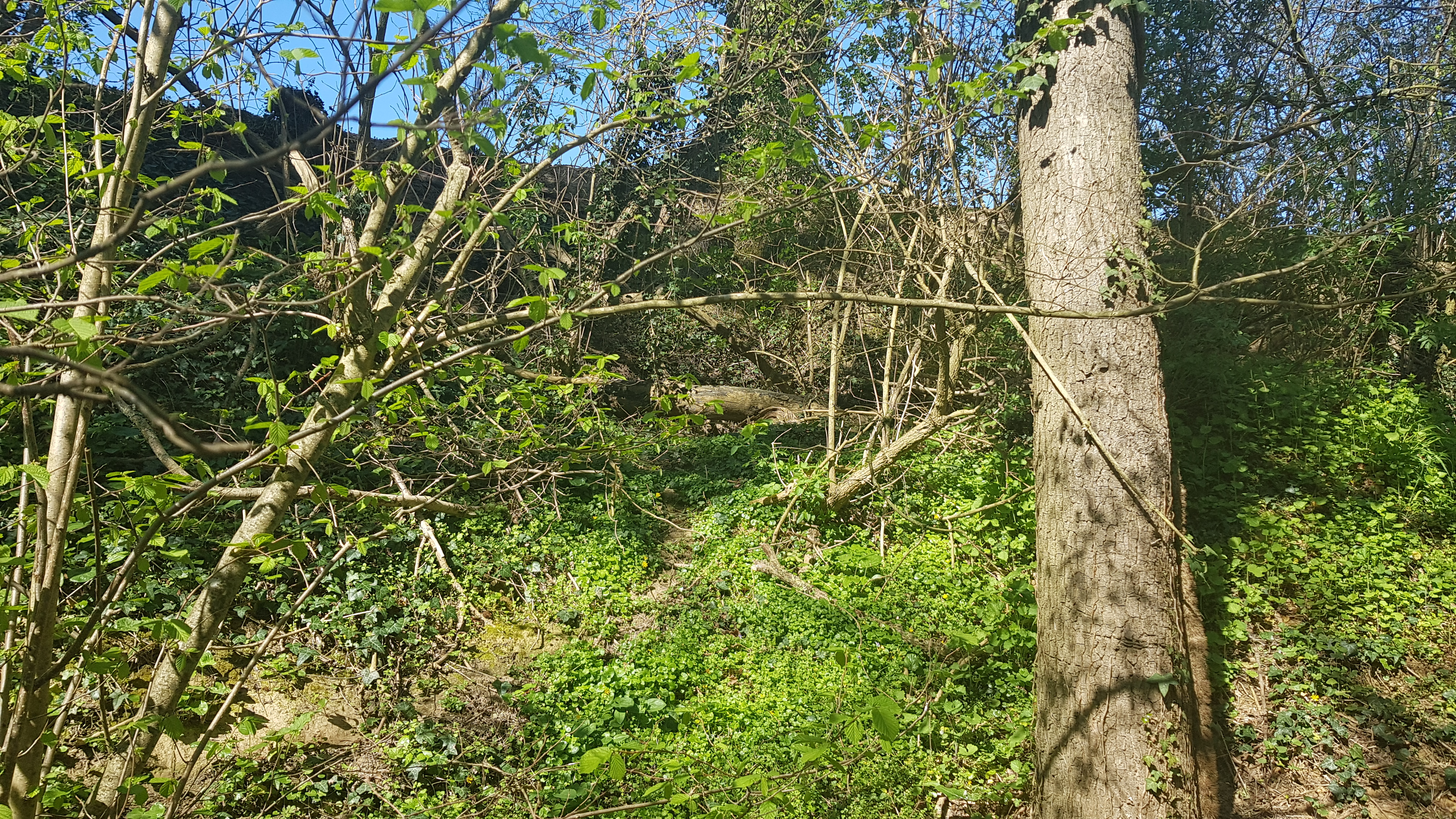 Groeve Essenbosch I in het Sint-Jansbosch, Oud-Valkenburg, Nederland